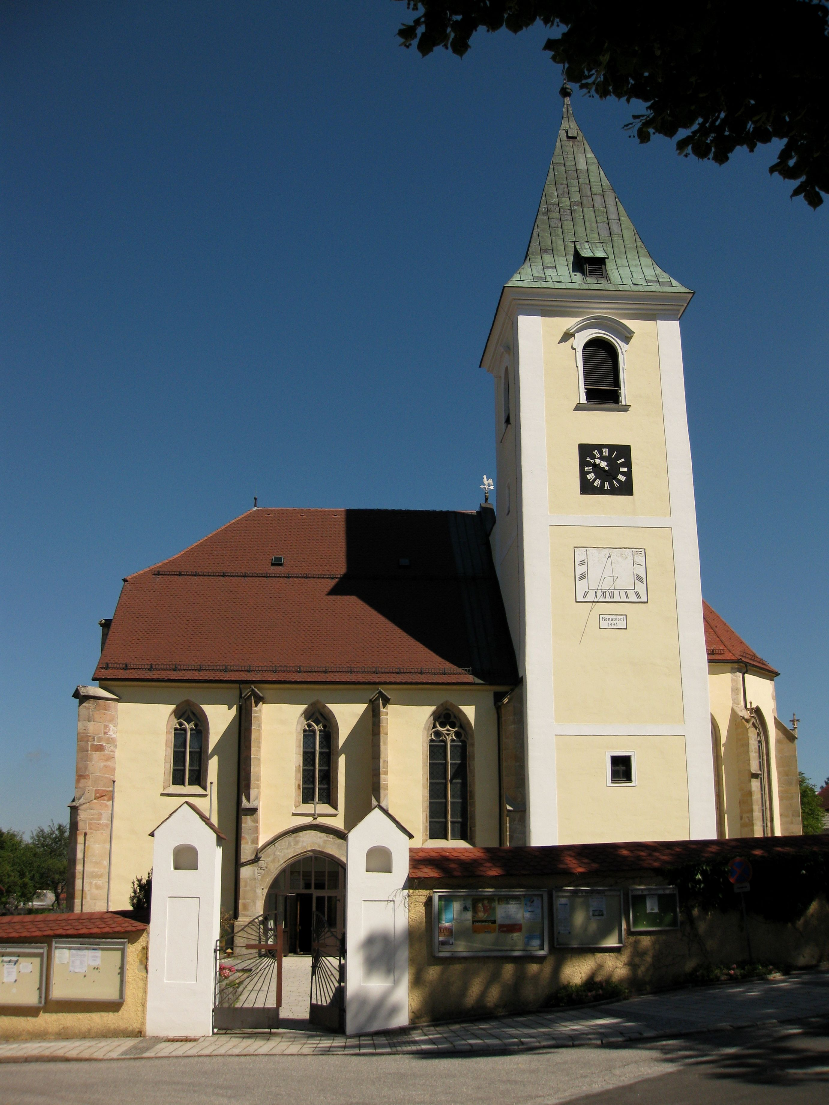 Kath. Pfarrkirche hl. Leonhard